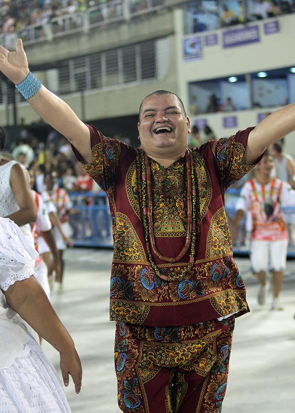 Fotógrafo Henrique Matos